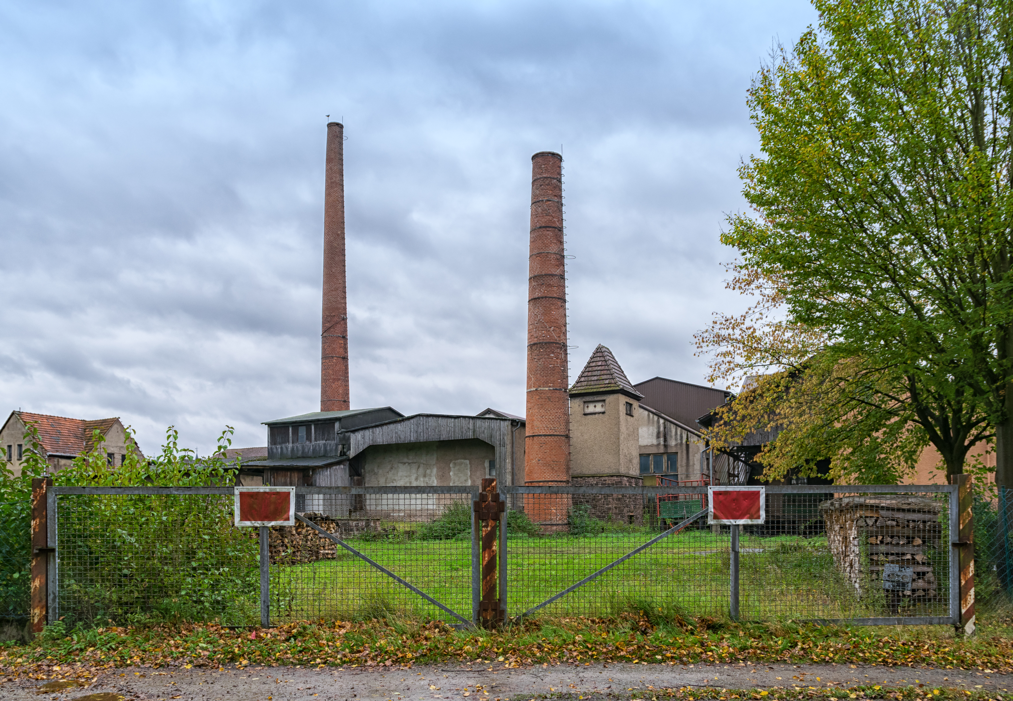 Industriebrache Georgshütte in Holzminden-Boffzen [überarbeitet]